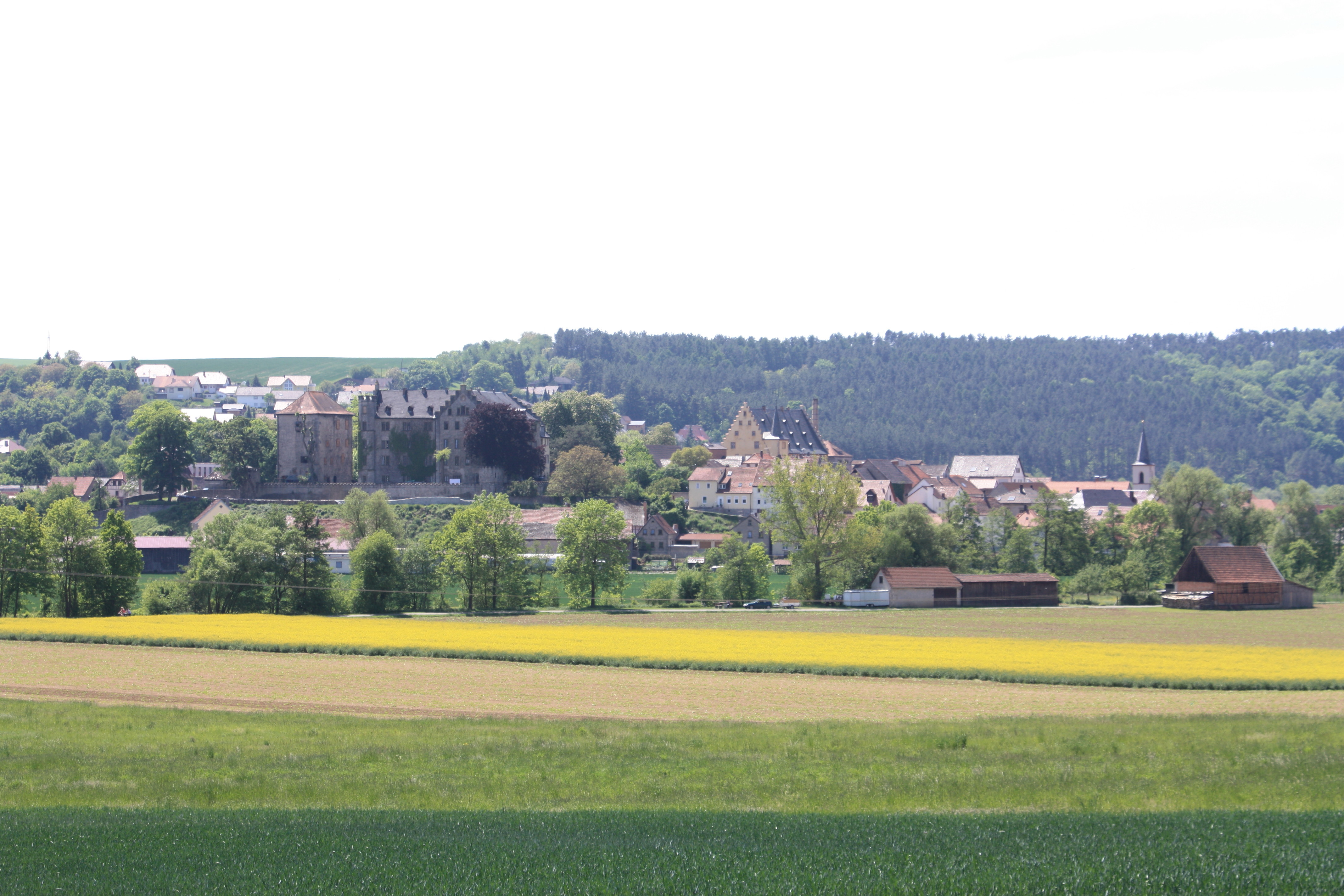 Thüngen von Nordosten